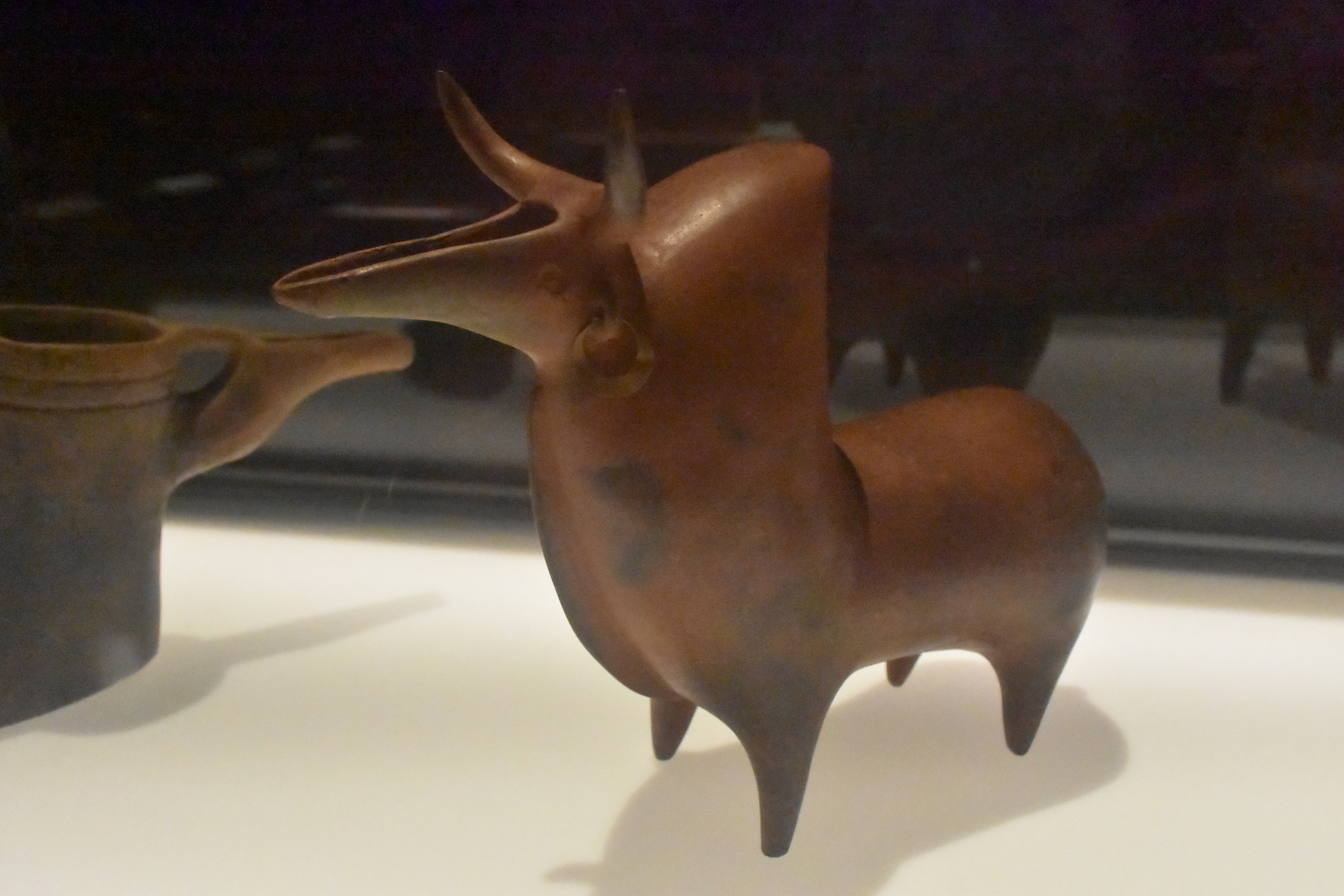 Ritón con forma de cebú. Ca. 1150-850 a. C. Procedencia: Marlik, Irán. Forma parte de la exposición Irán, cuna de civilizaciones en el MARQ.